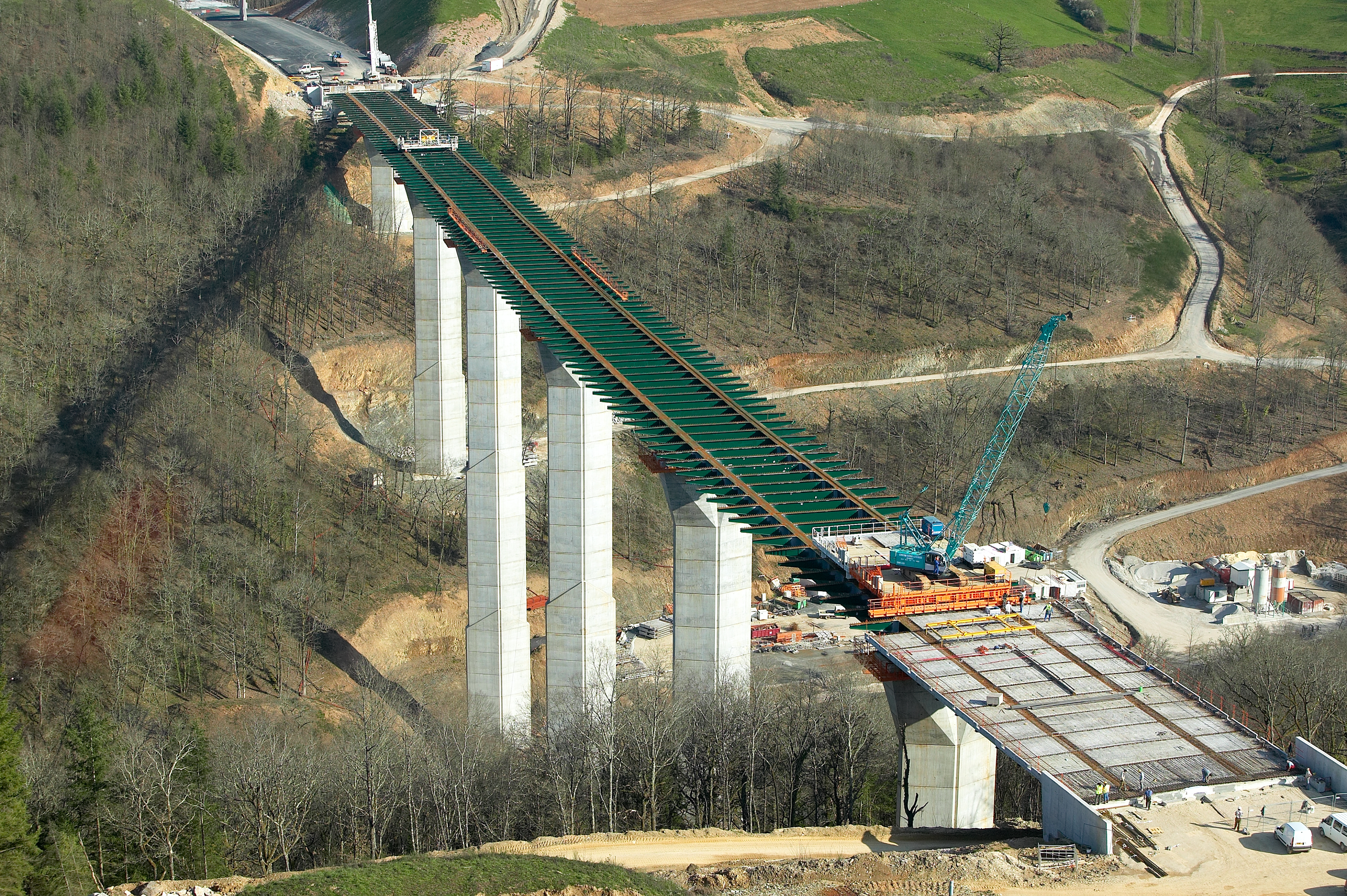 Viduc de l'Elle - Pose des prédalles à l'aide de chariots se déplaçant sur les poutres longitudinales